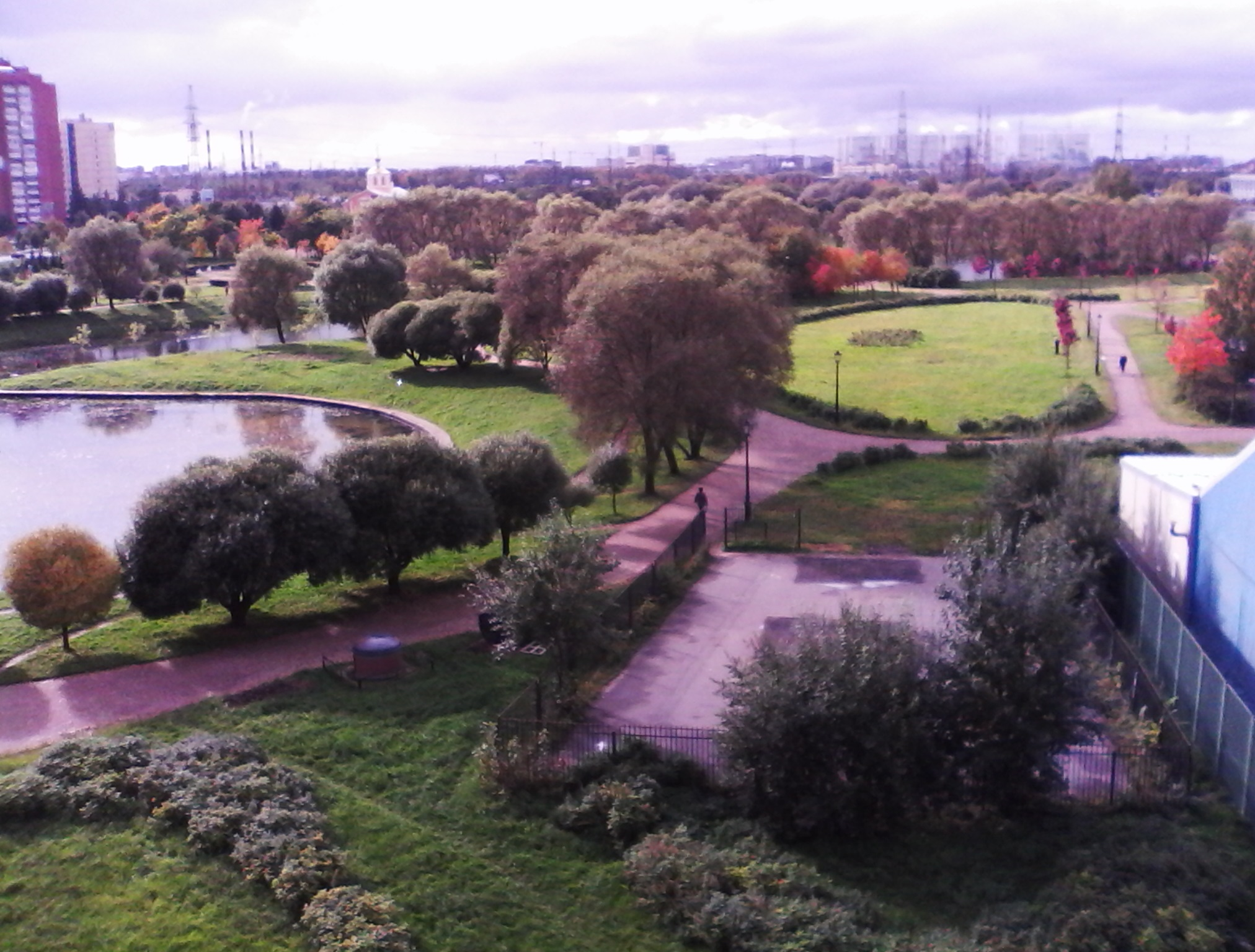 Парк Малиновка. 2 Октября 2017 года